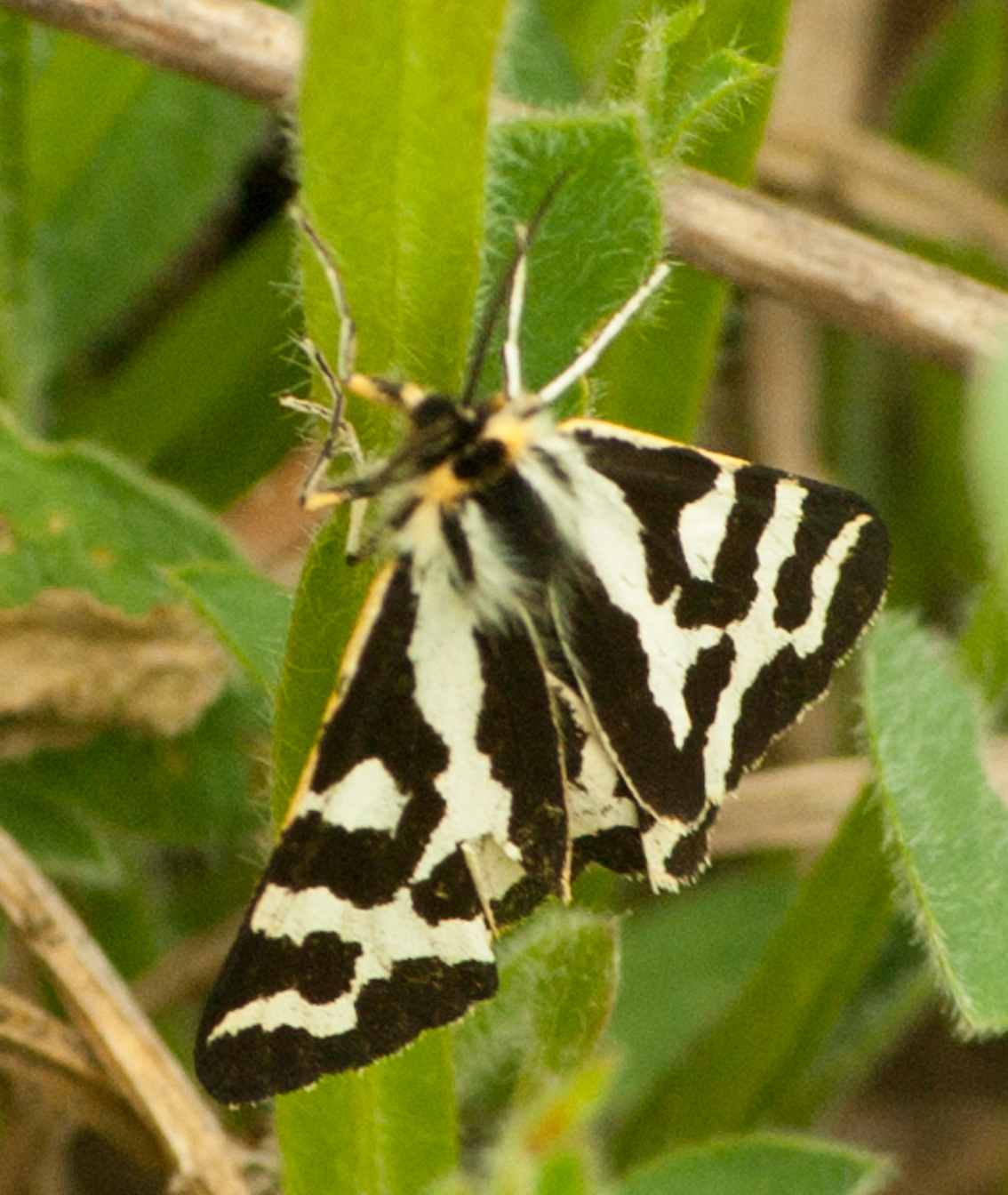 Parasemia plantaginis (Tribus Arctiini, Unterfamilie Arctiinae, Familie Erebidae)